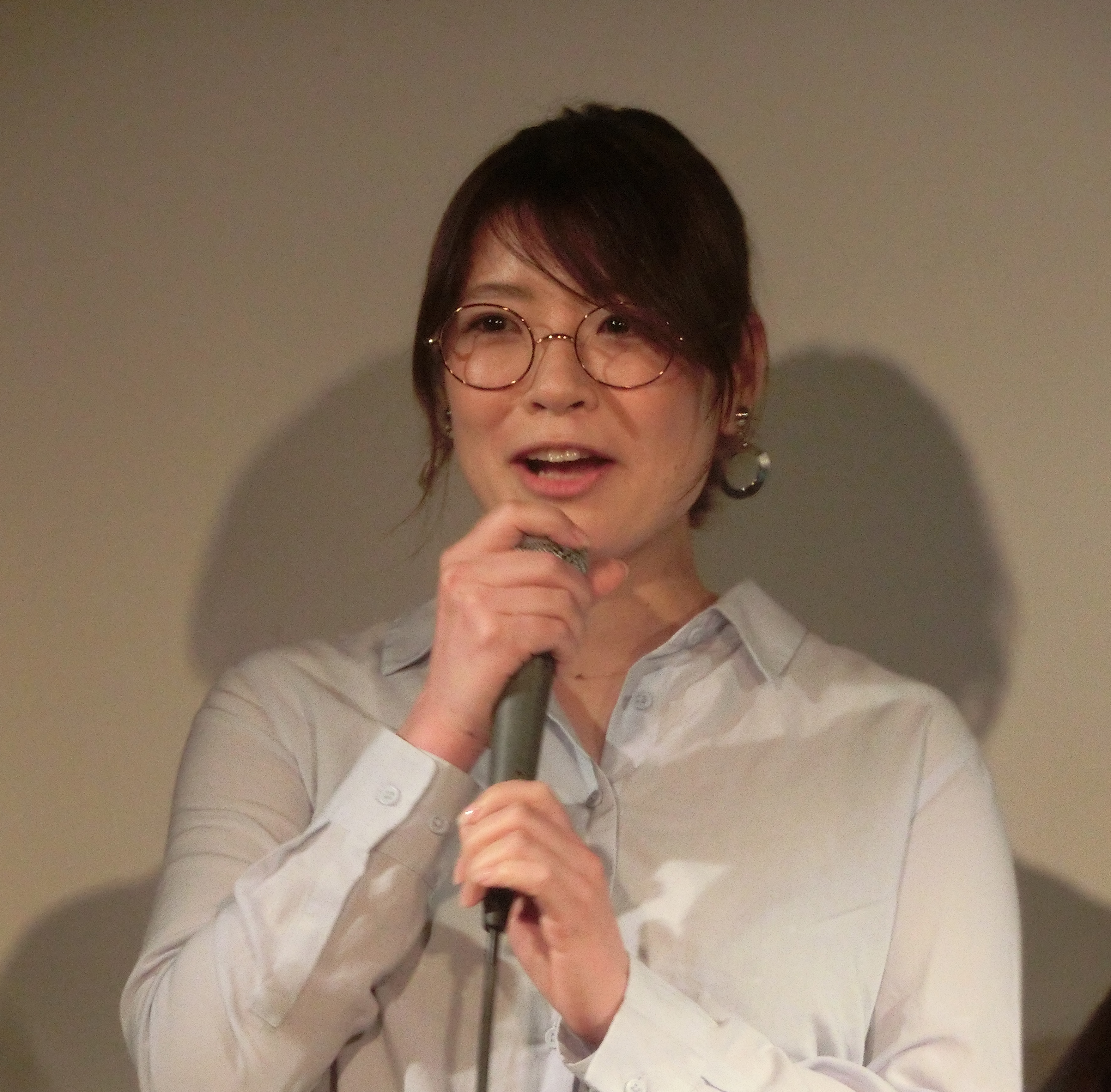 2019年10月6日、Adult video supporting actress prize